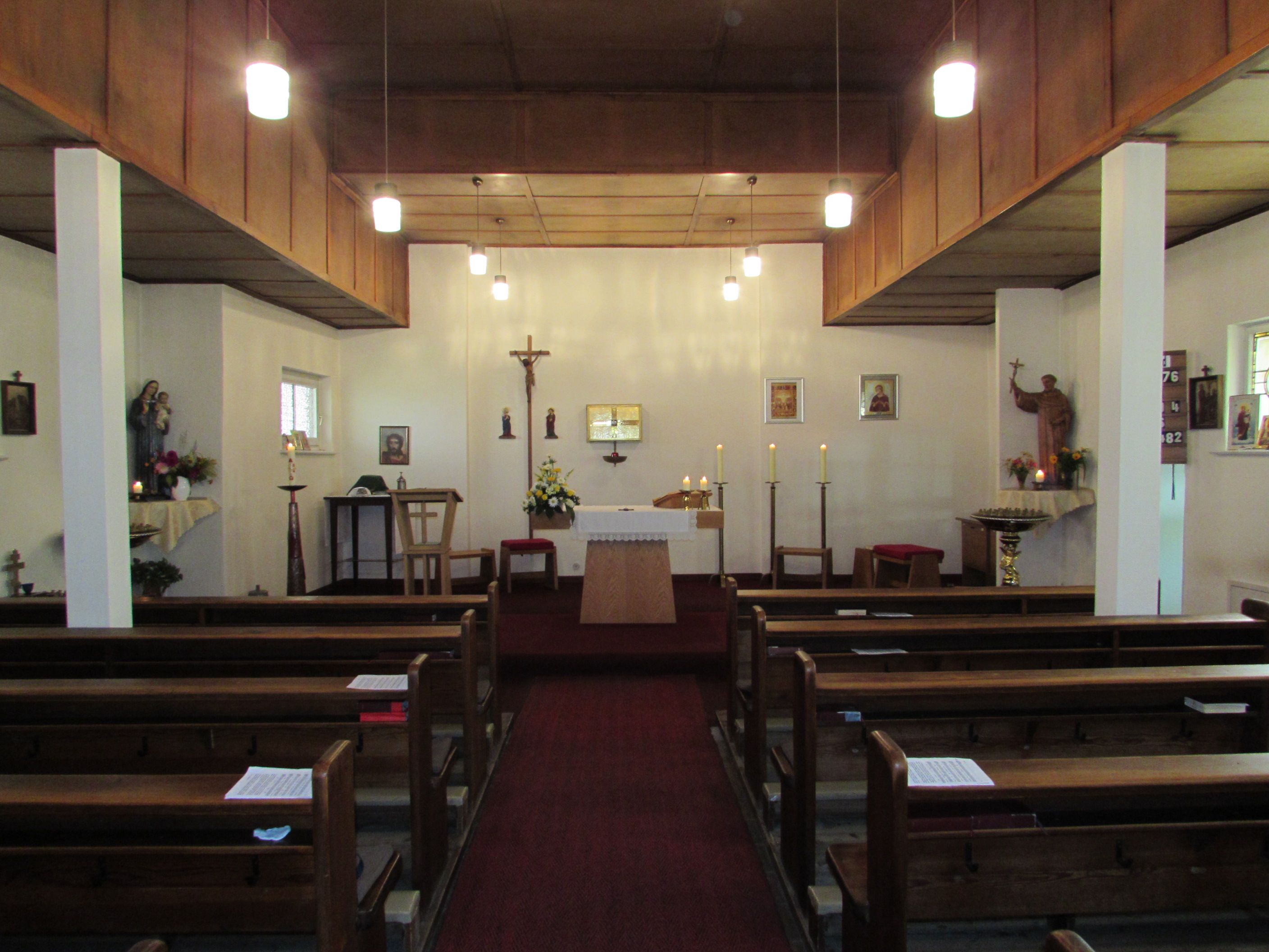 st bernhardkapelle brandenburg innen